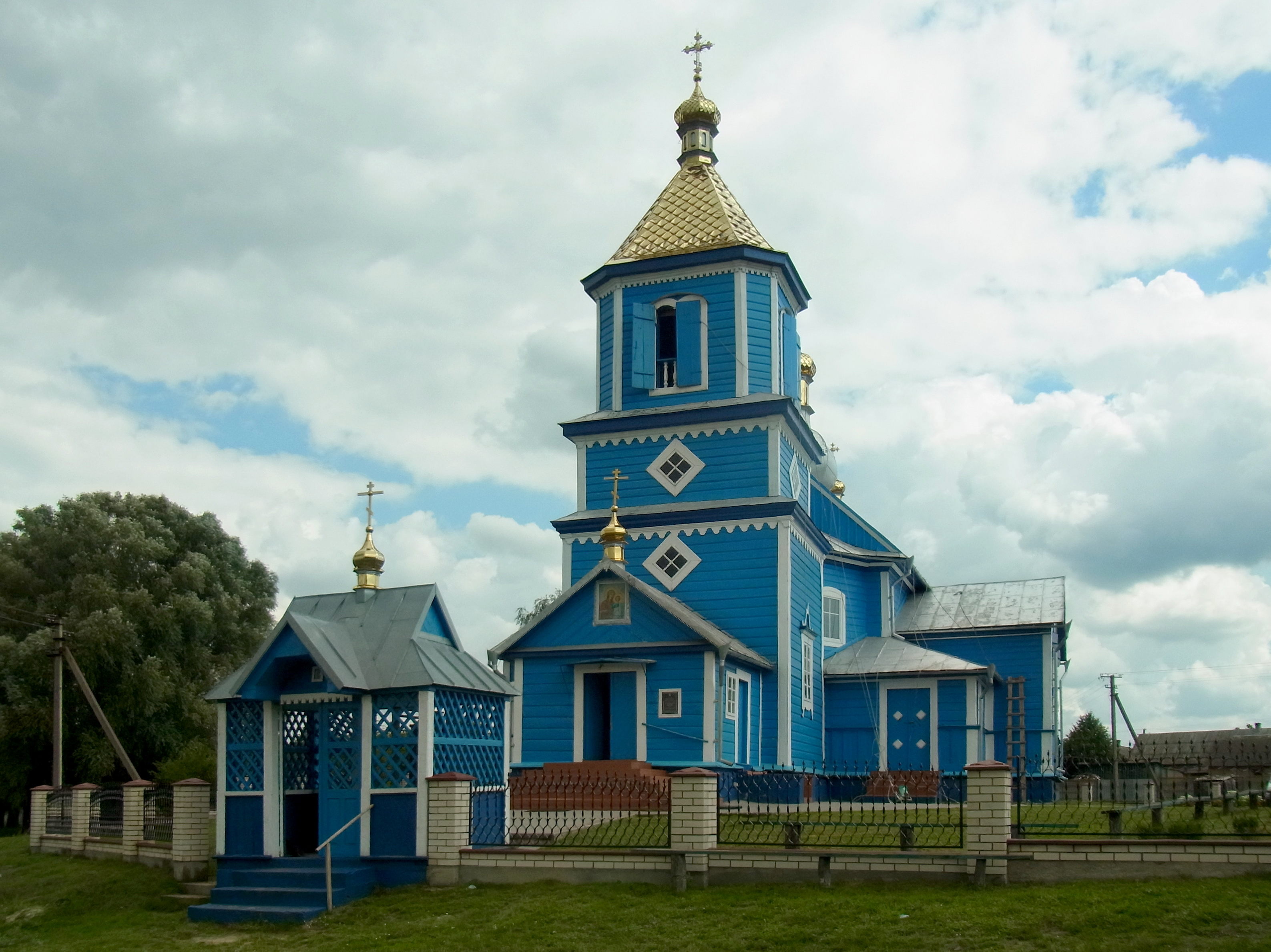 Казанська церква (дер.) (1801 рік) - вигляд із заходу - Піща Шацький район Волинська область Україна